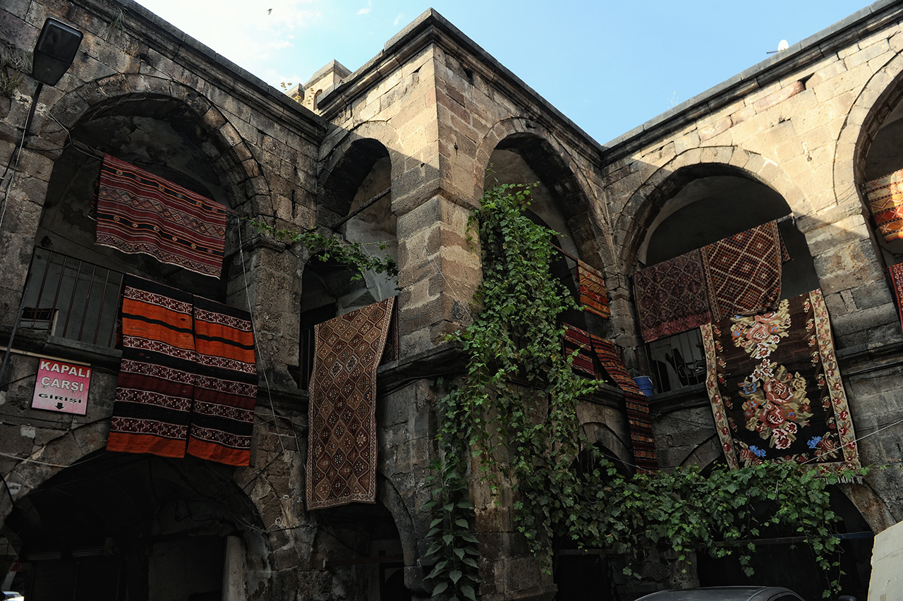 Bedestan 2013